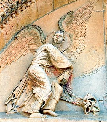 Weihrauchschwenkender Engel, Skulptur, Detail des Tympaons des früheren Cluniazenser-Priorats Notre-Dame du Pré, Donzy-le-Pré, Frankreich